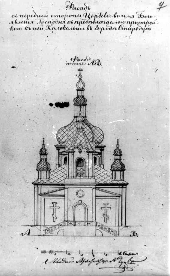 Беларуская (тарашкевіца): Старадуб (Staradub). Царква Божага Яўленьня, праект перабудовы званіцы ў маскоўскім стылі